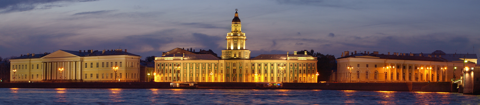 В 1714 году в Петербурге появился первый в России музей, который назвали на немецкий манер "Кунсткамерой", то есть "кабинетом редкостей".